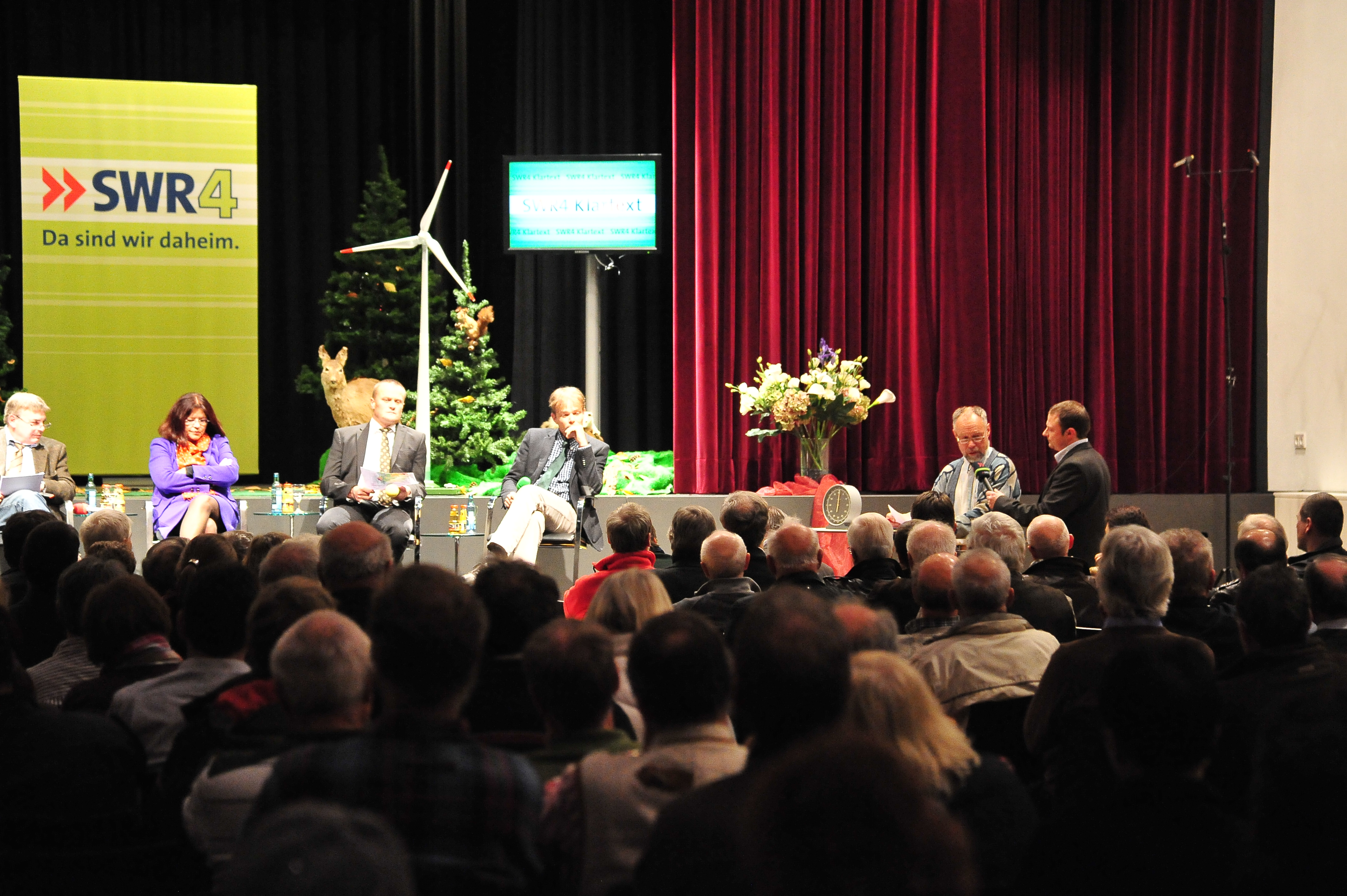 Initiative Pro Pfälzerwald; Teilnahme an der Diskussionsveranstaltung des SWR 4 "Hier sind wir daheim", Thema: Windkraft im Pfälzerwald?